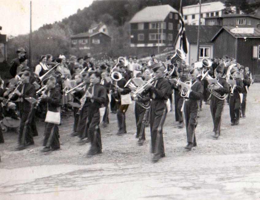 Åndalsnes, 17 Mai ca. 1953 - Guttemusikken